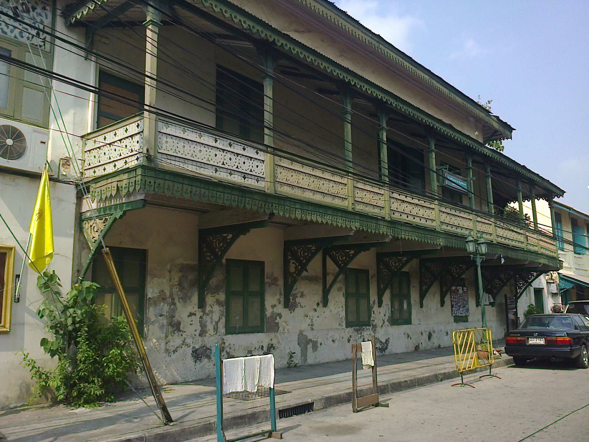 PHRAENG NARA